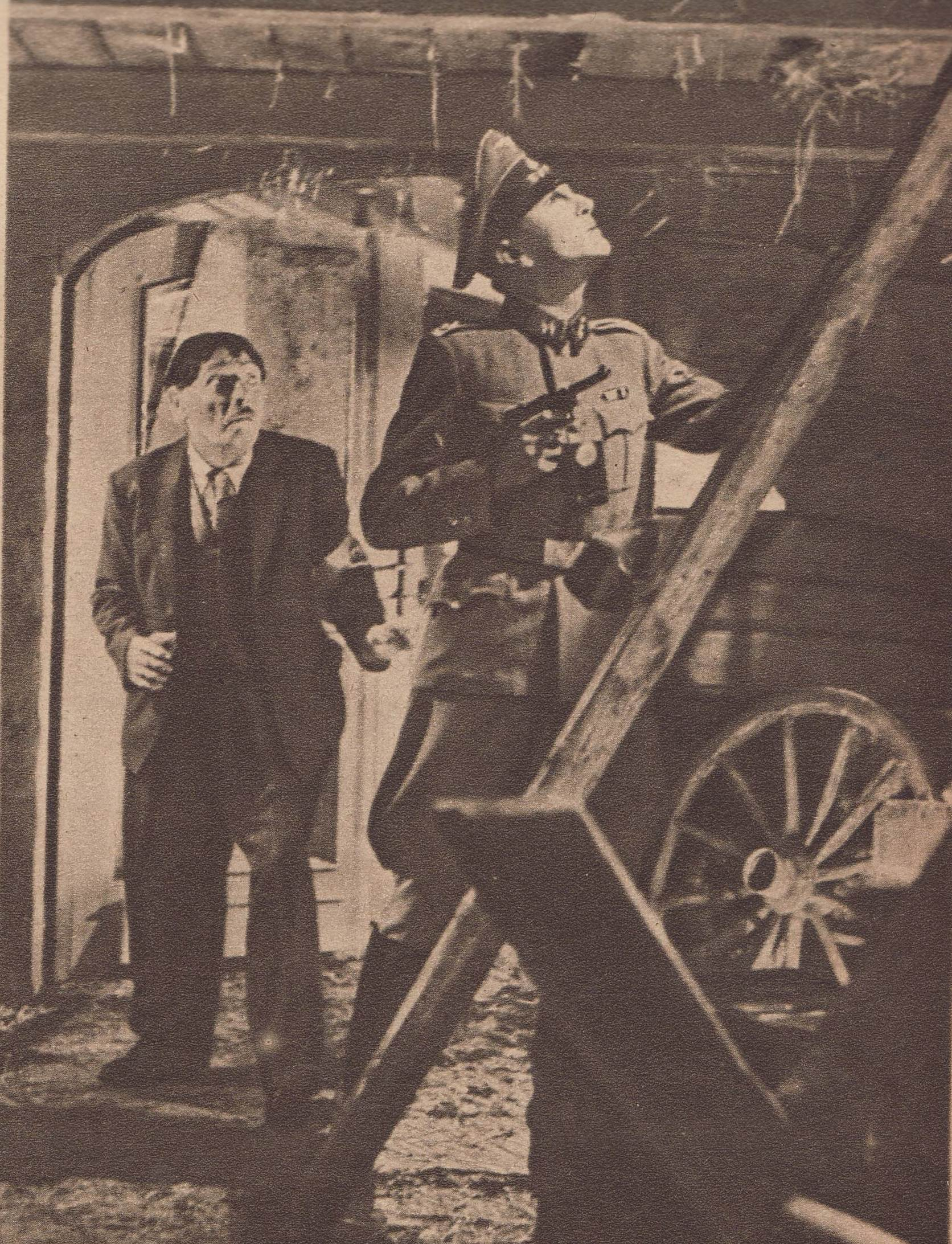 Kręcenie filmu Ulica Graniczna: J. Muclinger i S. Vrebota